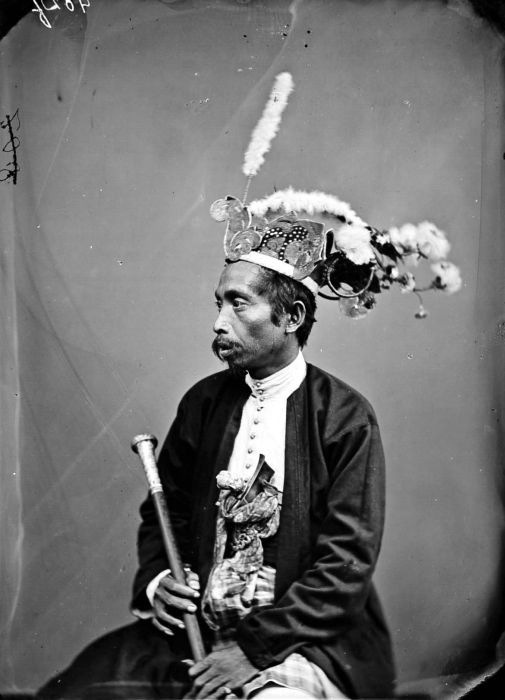 Repronegatief. Eerste minister van Buton, Zuid-Celebes